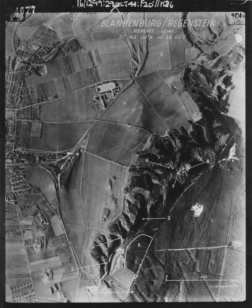 Luftaufnahme der Untertageanlage "Turmalin" bei Blankenburg. Das Foto stammt aus den Military Intelligence Photographic Interpretation Reports (MIPI Reports) des Hauptquartiers der U.S. Army Air Forces. Diese Bestände befinden sich in den Beständen der National Archives, Washington (Record Group 341).